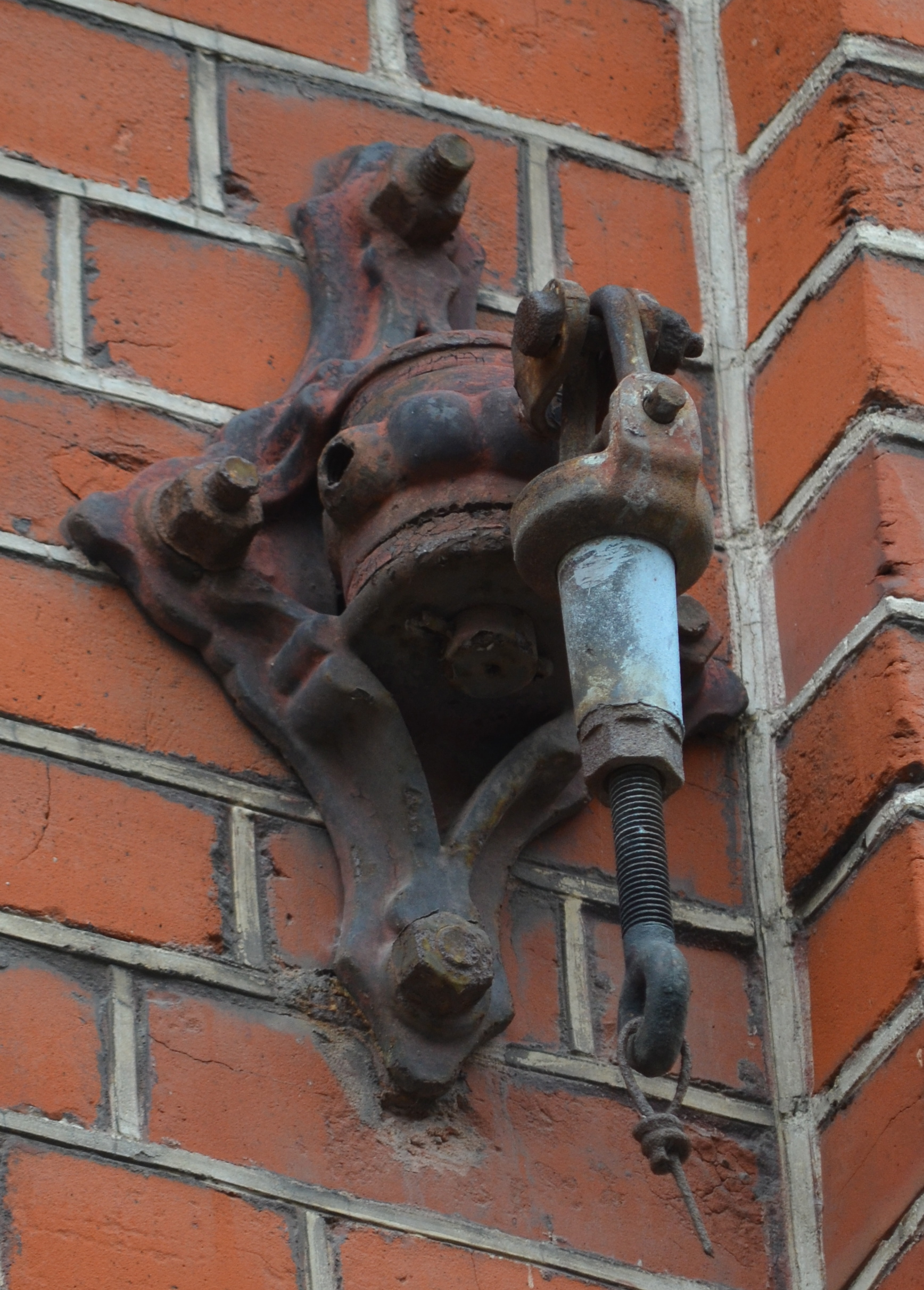 Charleroi (Belgique) - Rosace située rue Tumelaire n° 91. Les rosaces sont des ancrages installés pour tenir les haubans qui soutiennent les fils électriques alimentant les tramways électriques.